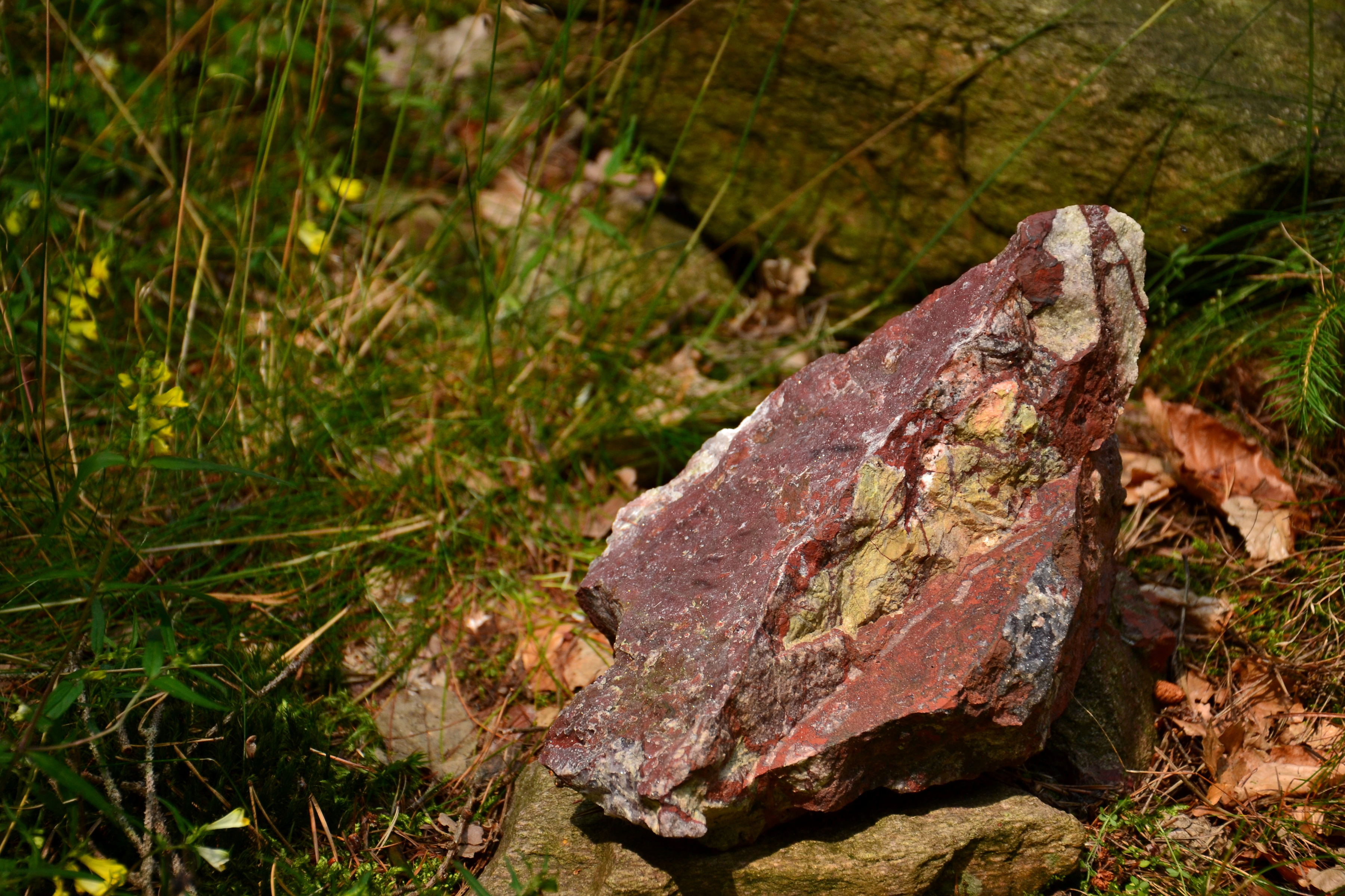 Jaspis